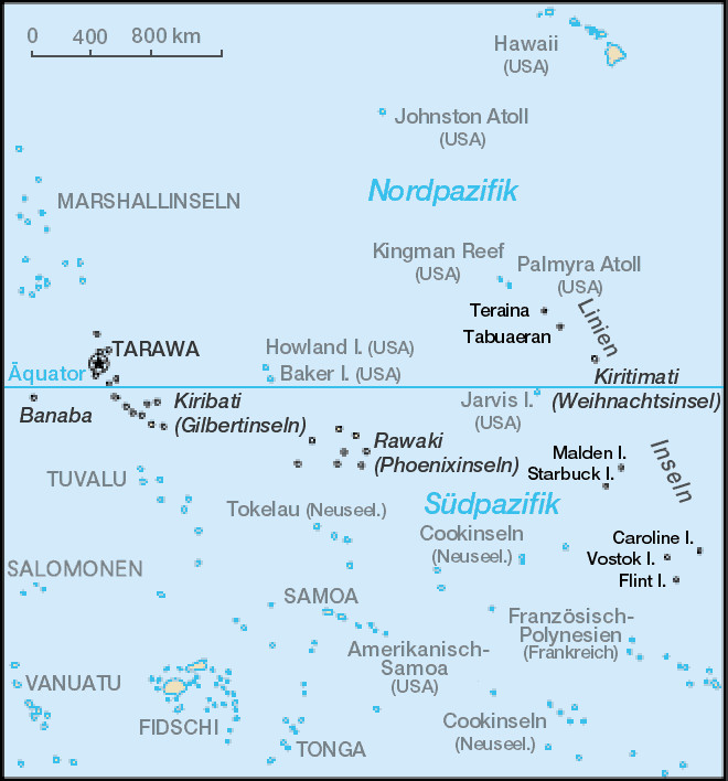 Kiribati